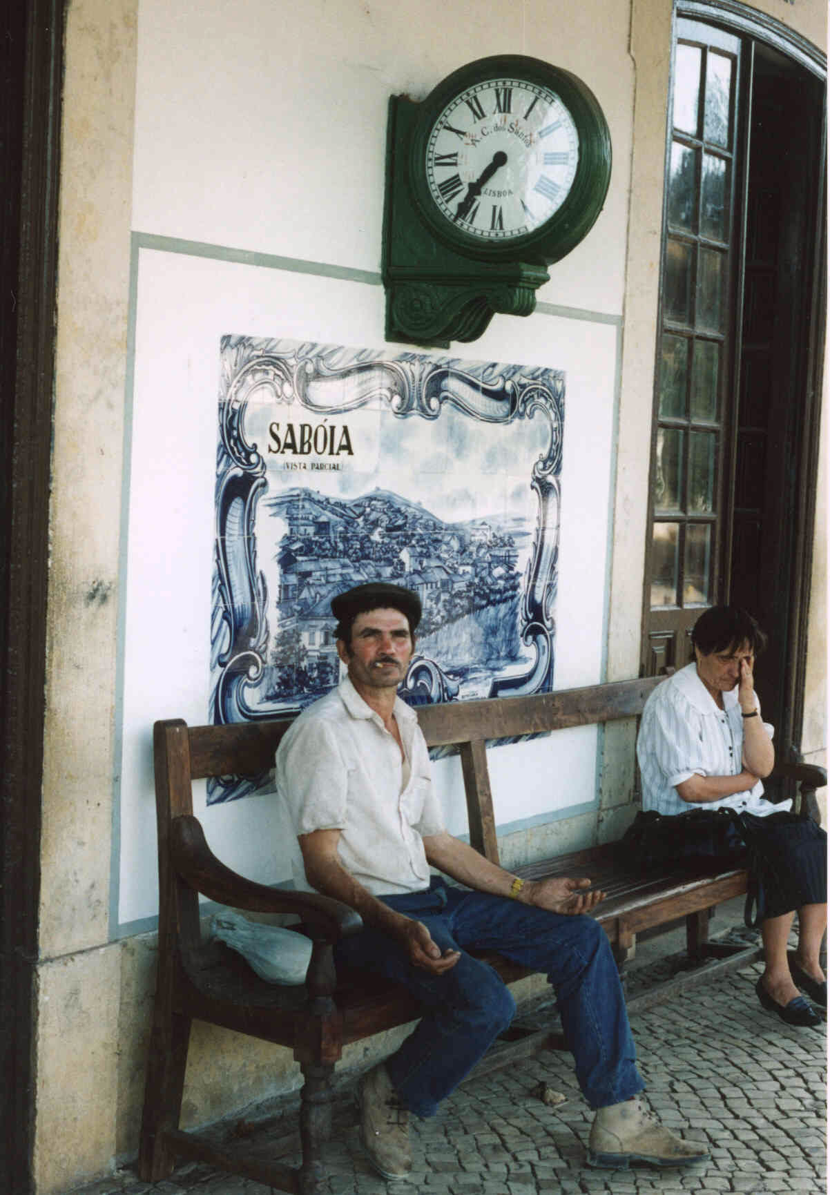 Station Saboia Alentejo Portugal